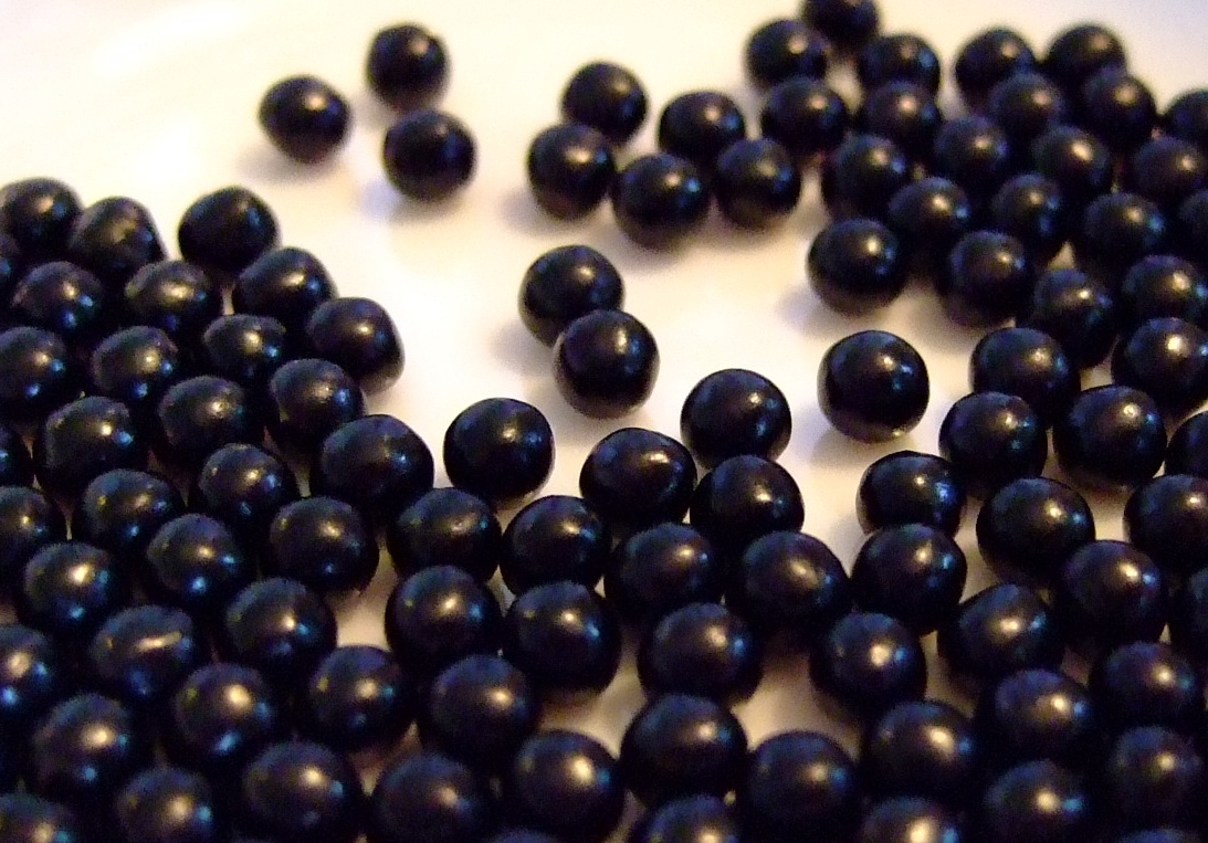 御岳百草丸の粒